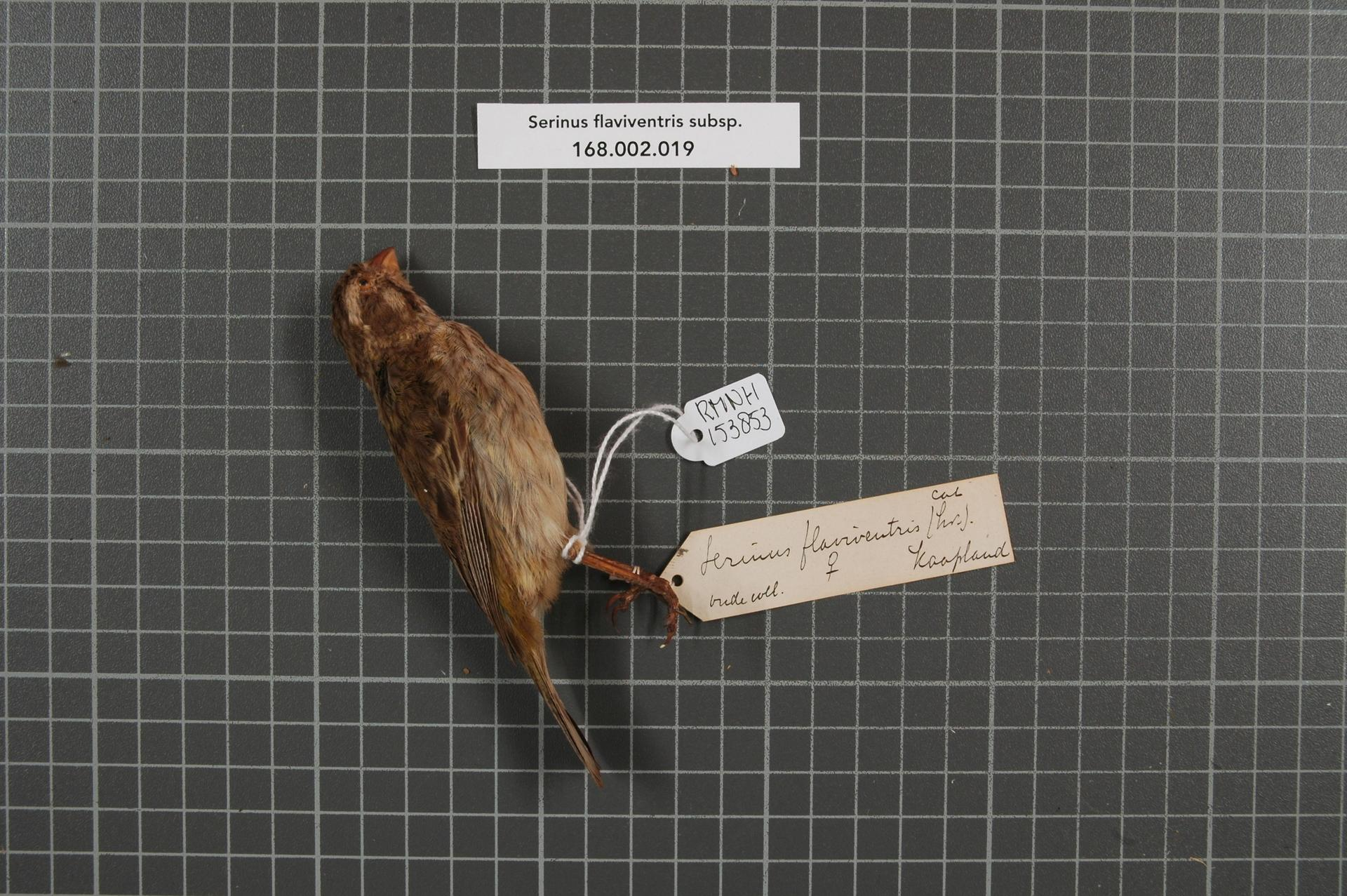 Serinus flaviventris subsp.